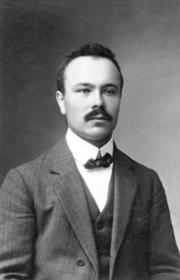 De Paul Noesen fotograféiert vum Paul Kutter.